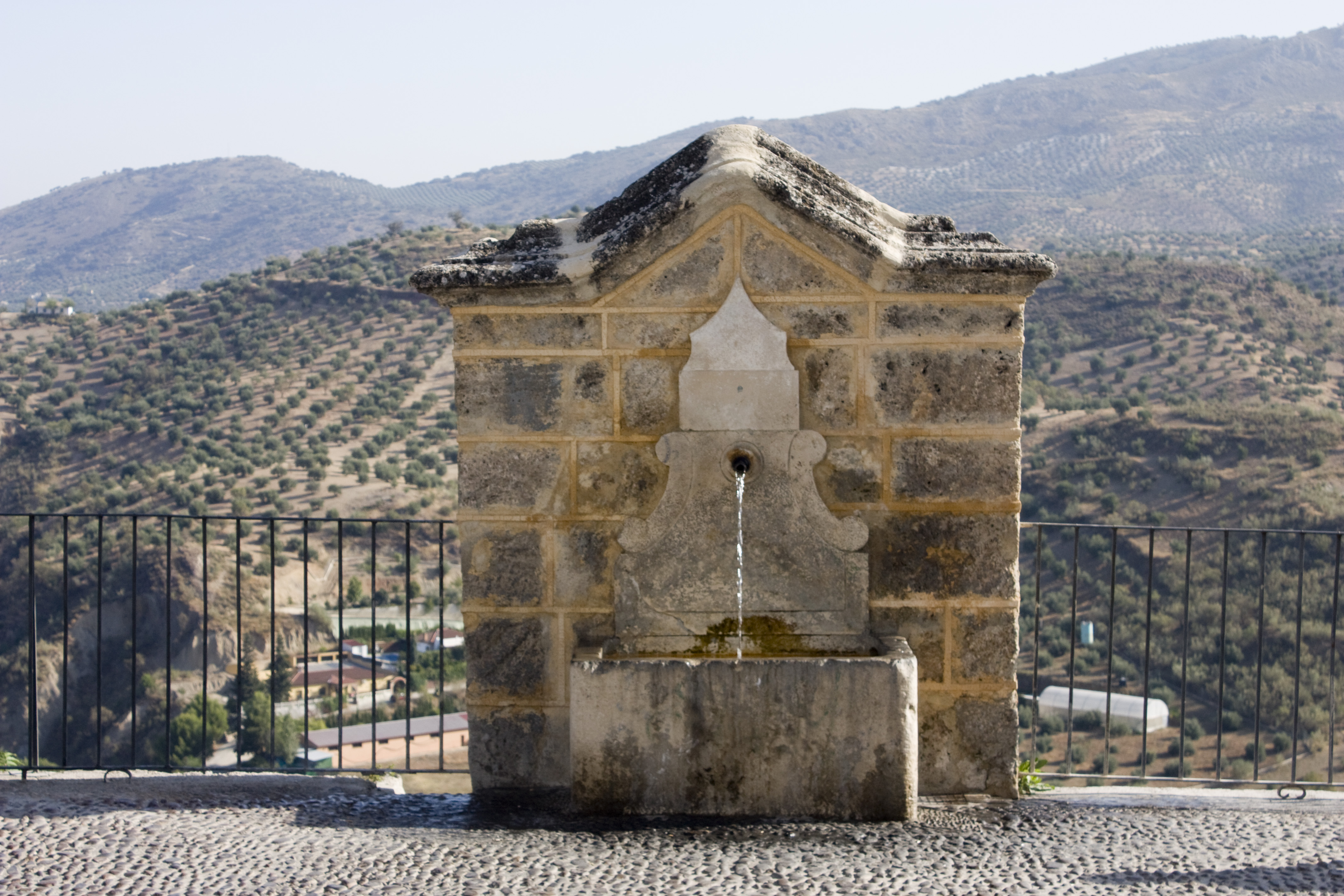 Fontaine des remparts.